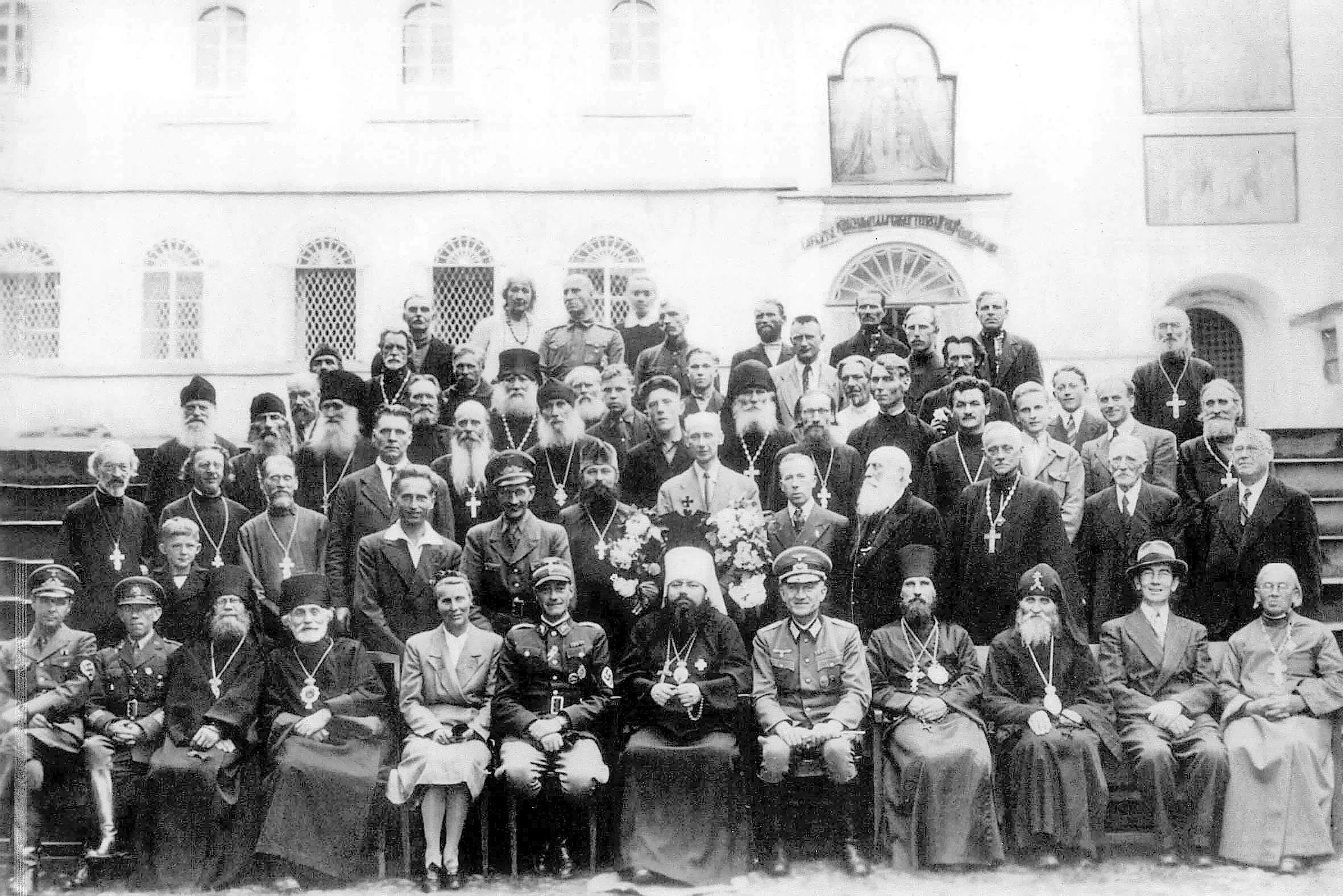 Монахи Псково-Печорского монастыря с архиереями Прибалтийского экзархата и немецкими военными и гражданскими чинами оккупационной администрации